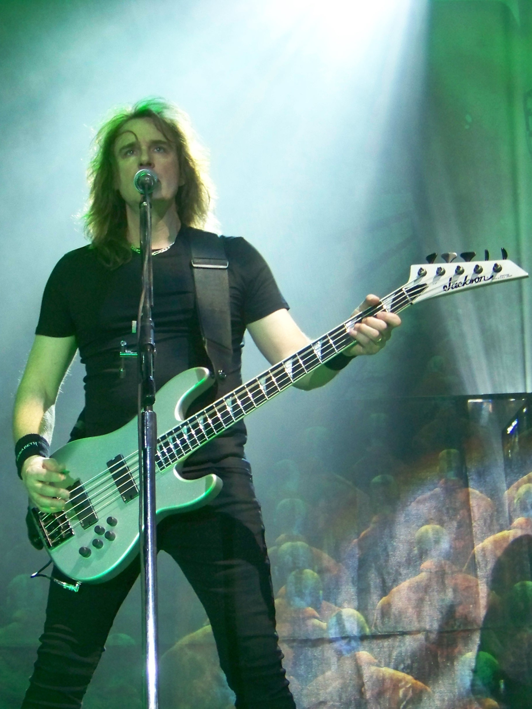 Фото Дэвида Эллефсона из Megadeth. Март 2011, Киев, концерт Megadeth и Slayer.